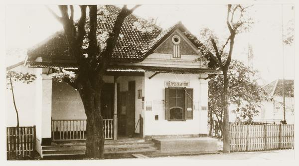 Hulppostkantoor te Tempeh, Oost-Java (KITLV 30413)